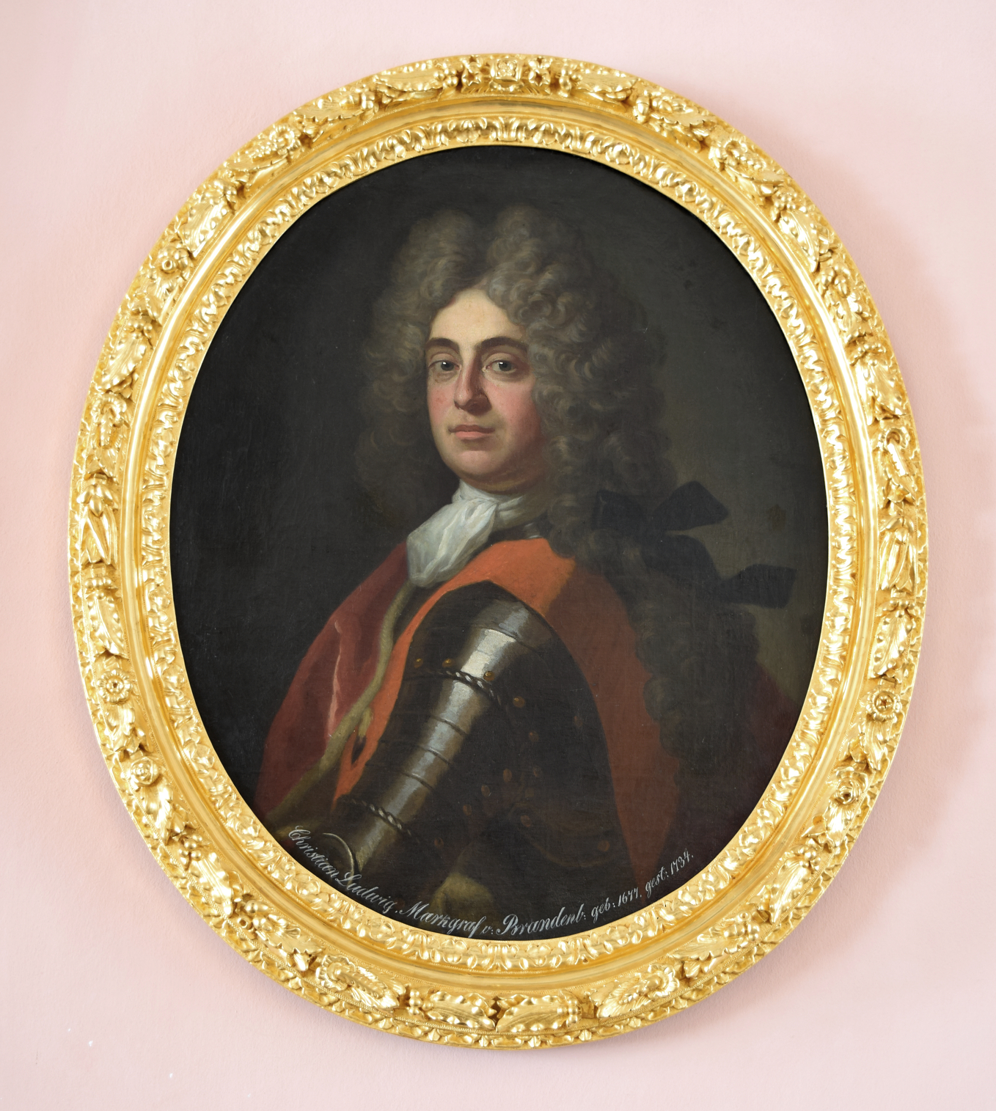 Christian Ludwig von Brandenburg-Schwedt um 1705 als Gemälde von Friedrich Wilhelm Weidemann im Schloss Caputh